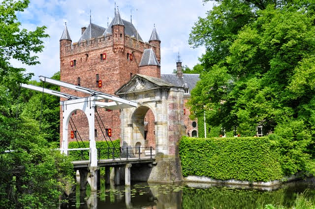 prachtig kasteel